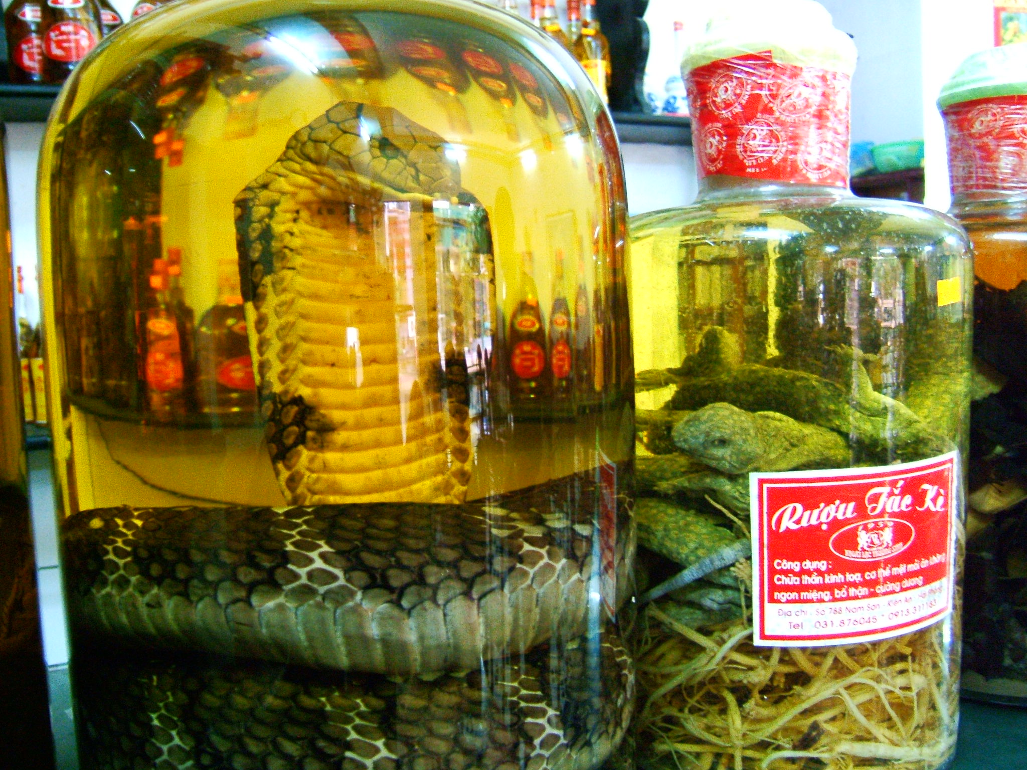 Ruou thuoc